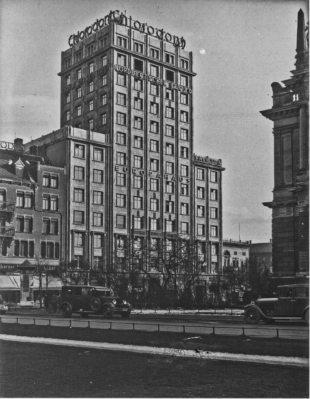 Das Europahaus im Jahre 1930.